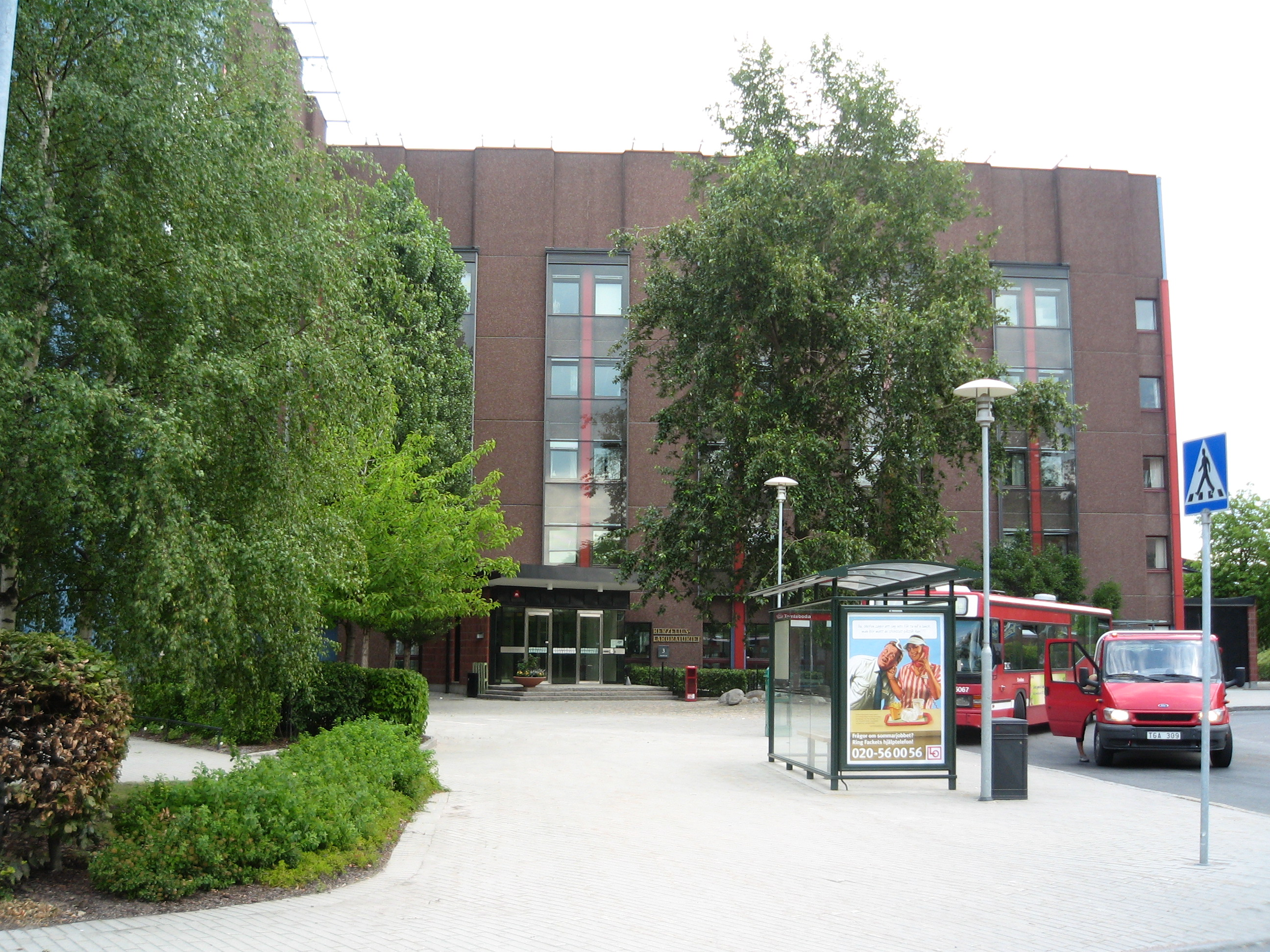 Universitetsbiblioteket och Berzeliuslaboratoriet, KI Solna